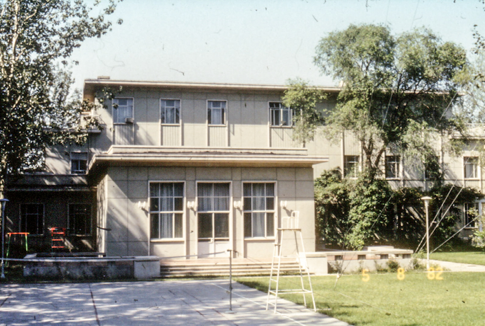 A magyar nagykövetség épülete Pekingben 1983 körül, a kertből nézve